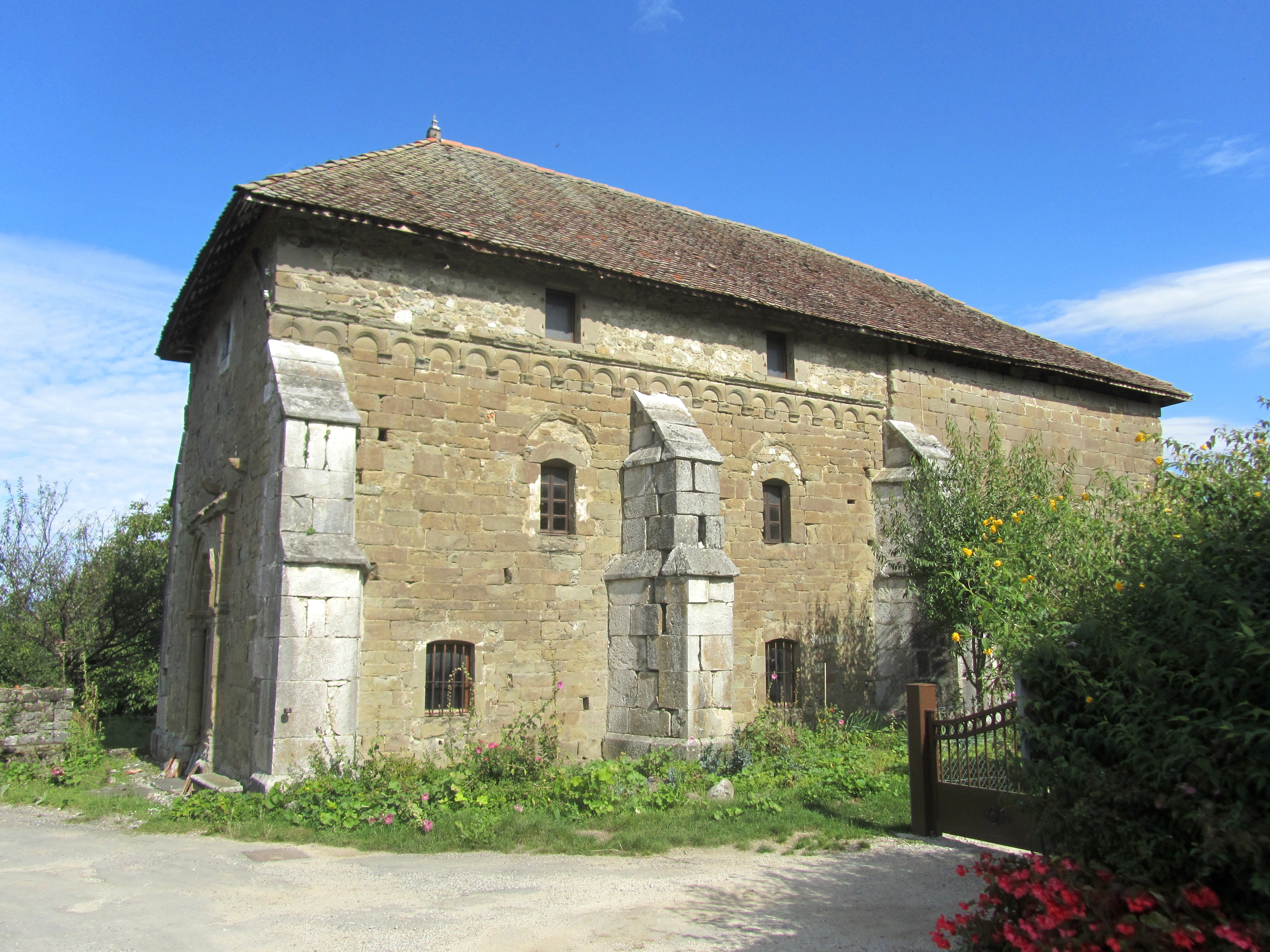 la Chapelle de Moussy, près de Cornier (Haute-Savoie)